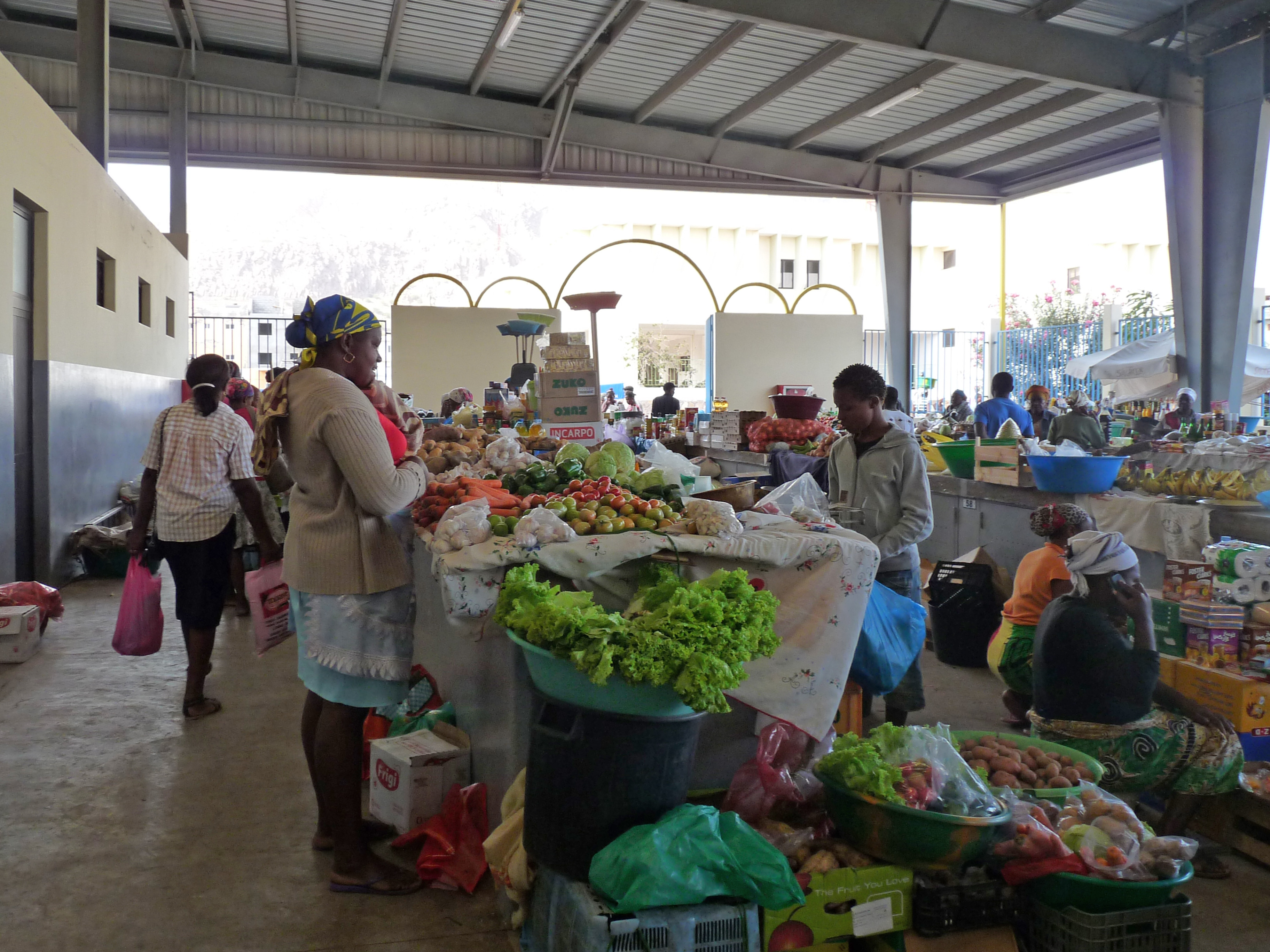 Tarrafal (île de Santiago, Cap-Vert) : marché municipal